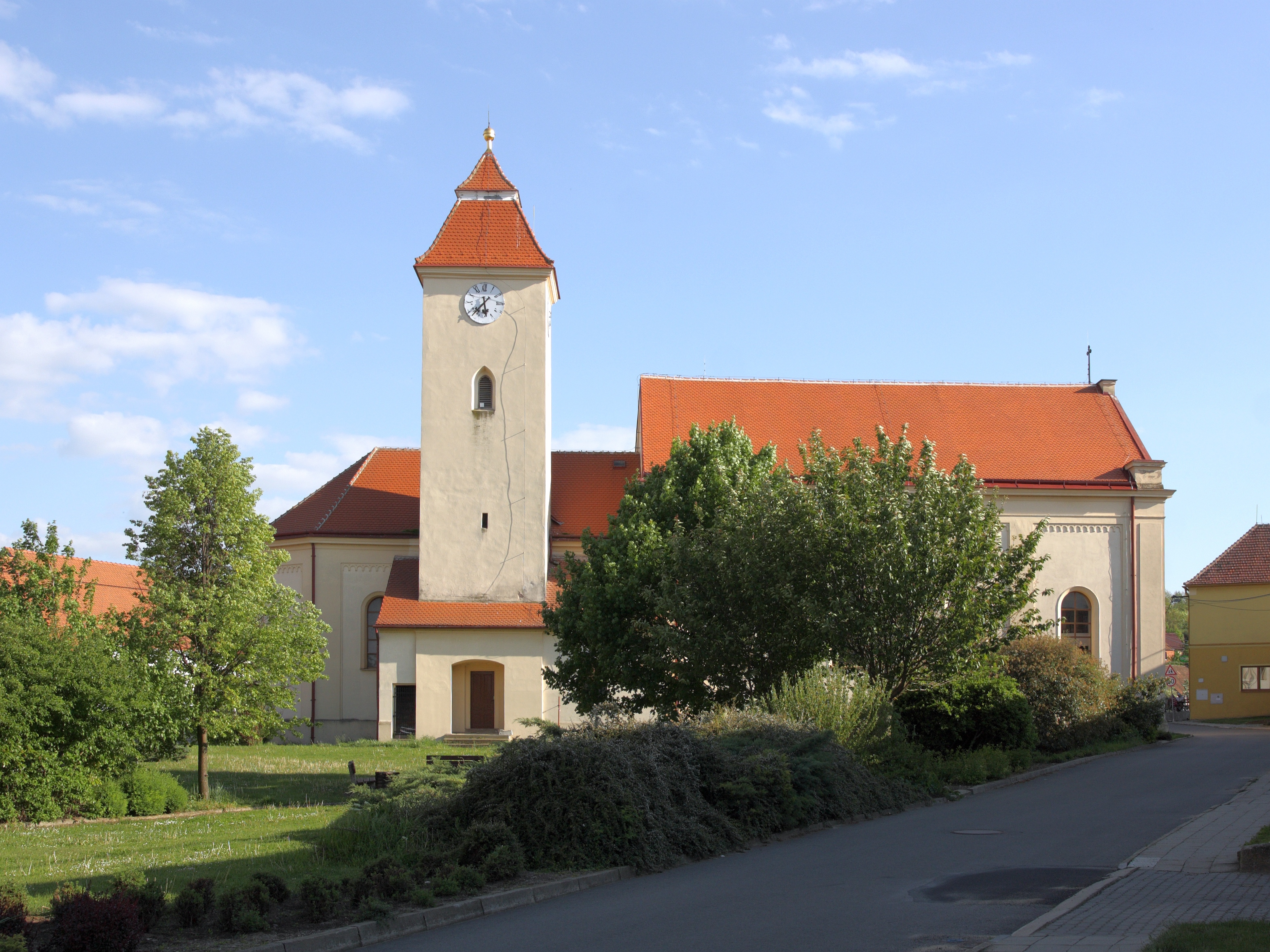 Starovice - kostel sv Jiří.